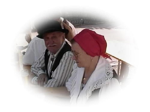 Feckerchilbi, Fest des jenischen Volkes, in Gersau, Schweiz, 2003